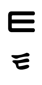 Korean Alphabet ㅌ(ti.eut)